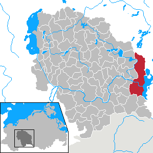 Plau am See in Mecklenburg-Vorpommern - District Parchim